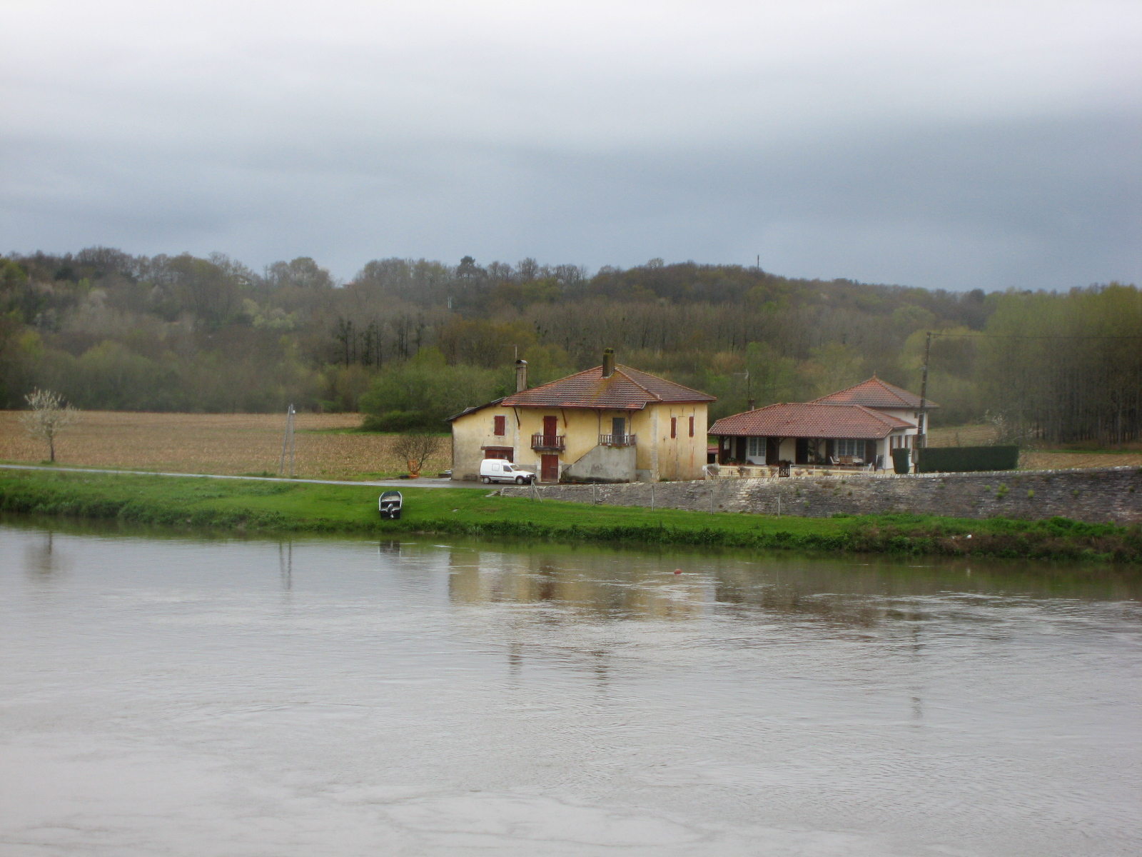 L'Adour à Port de Lanne (Landes (département)) (Pyrénées).